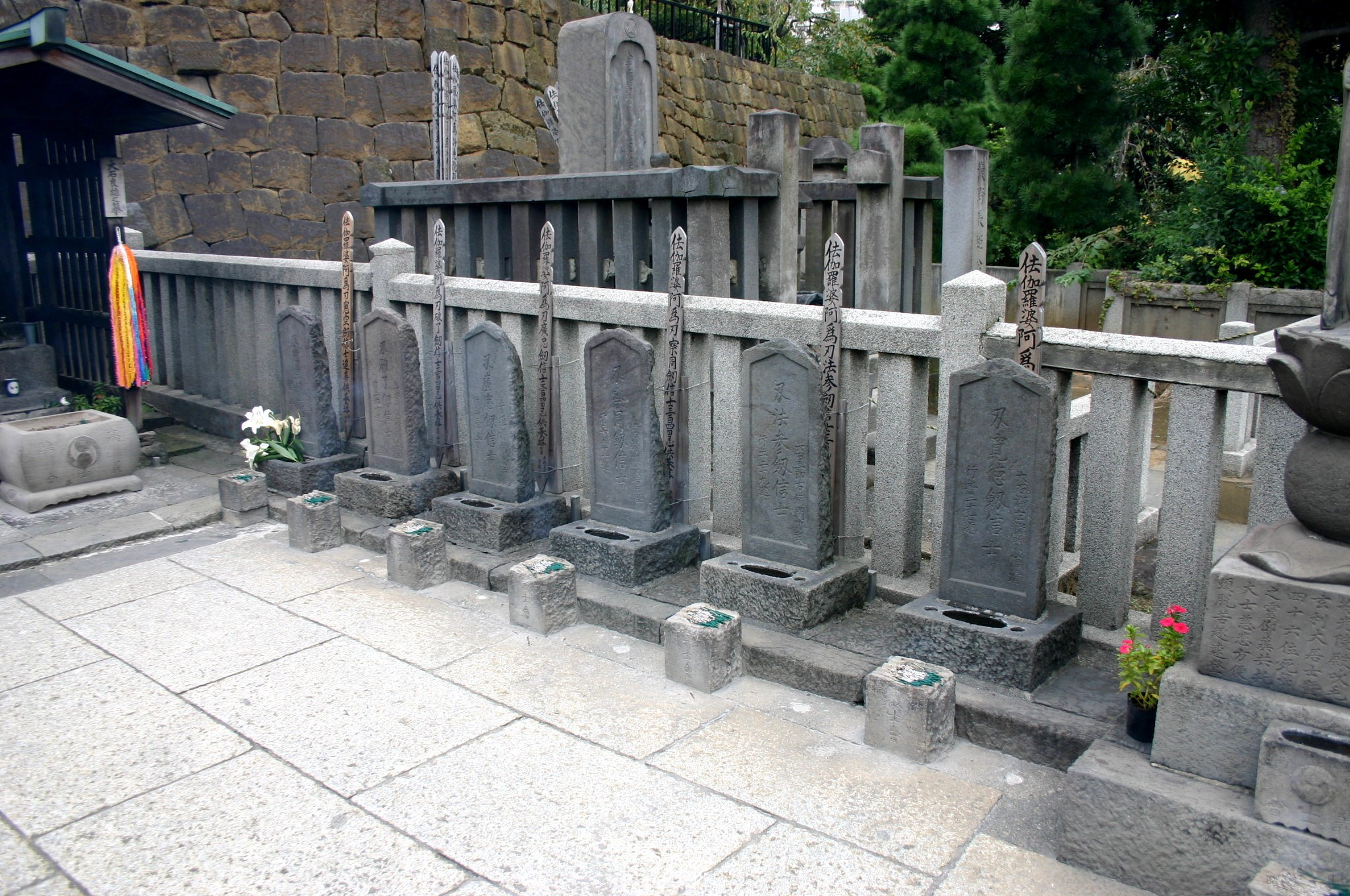 Tombe dei 47 ronin (o 47 gishi). Fotografia scattata da me al tempio Sengakuji di Tokyo il 2 novembre 2006.